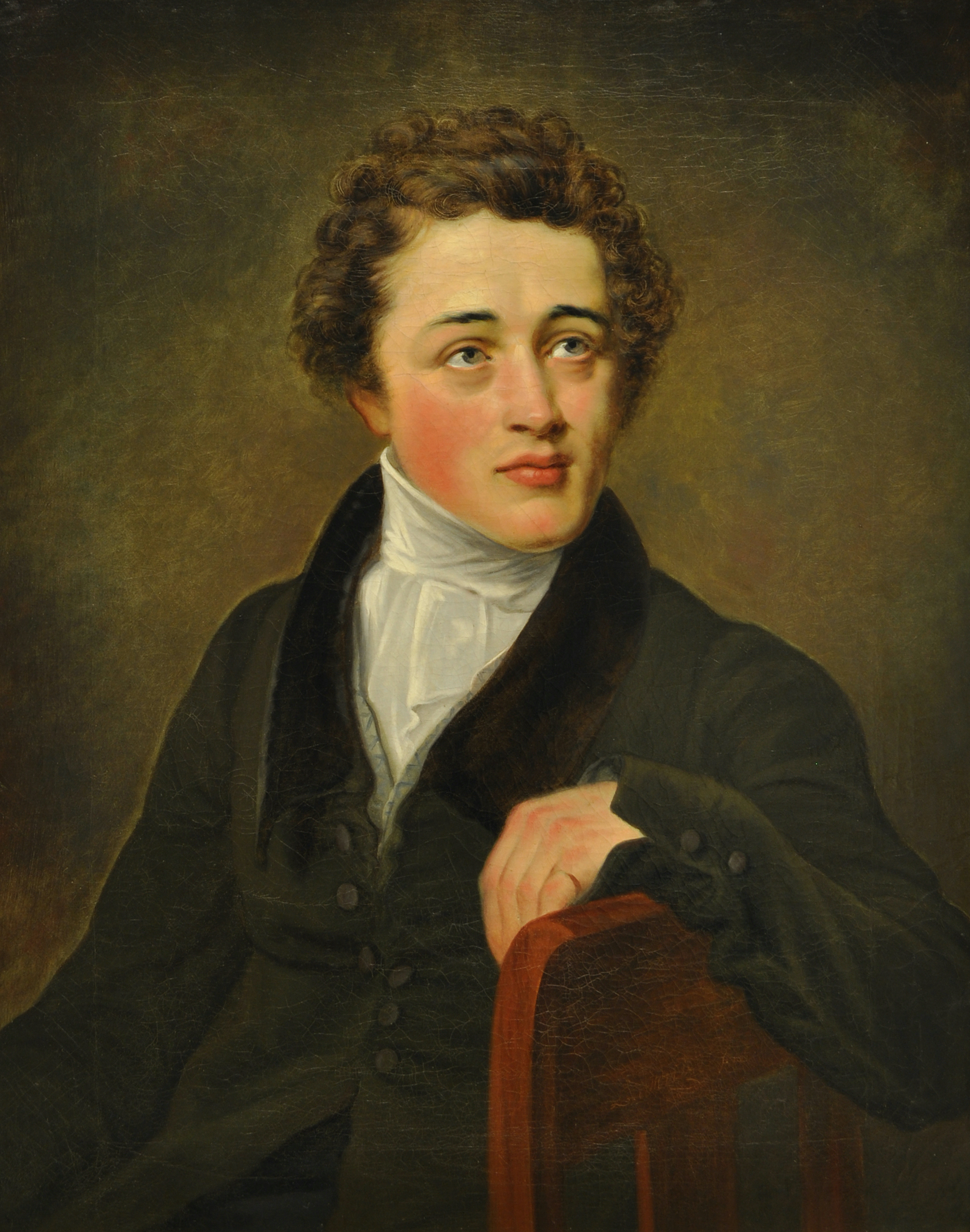 Portret Jacques Antoine Bonebakker (1798-1868)